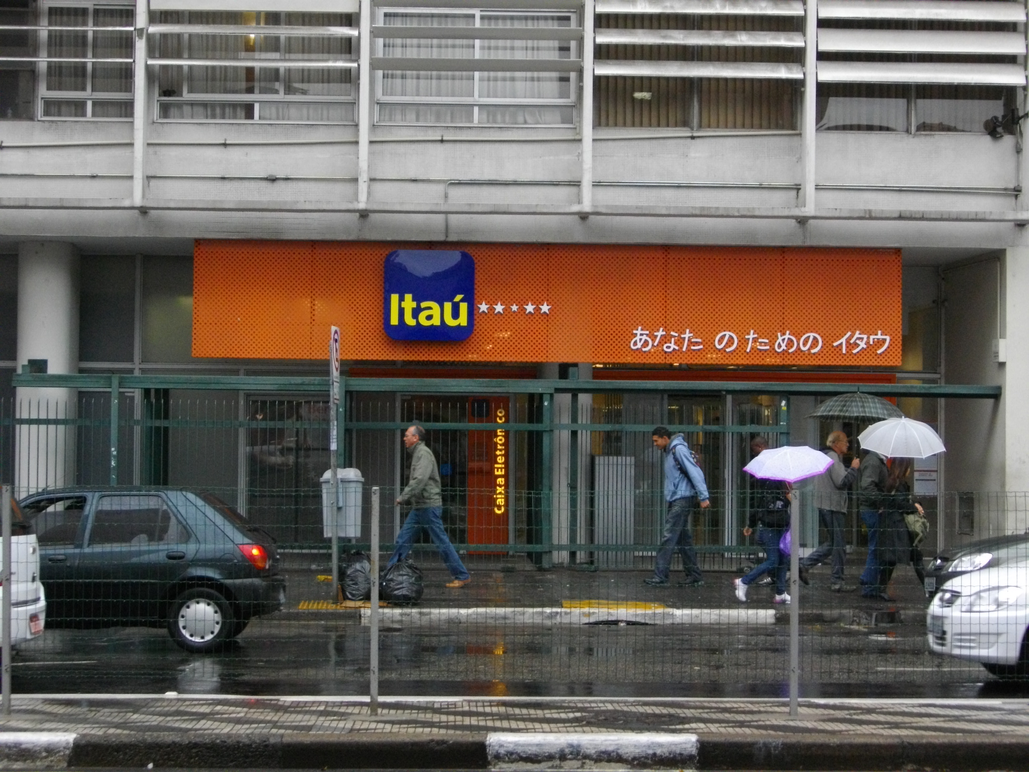 サンパウロの東洋人街（旧・日本人街）の銀行。 この支店だけ、日本語表記がある。 通常店舗は、ポルトガル語表記。（Feito Para Você）